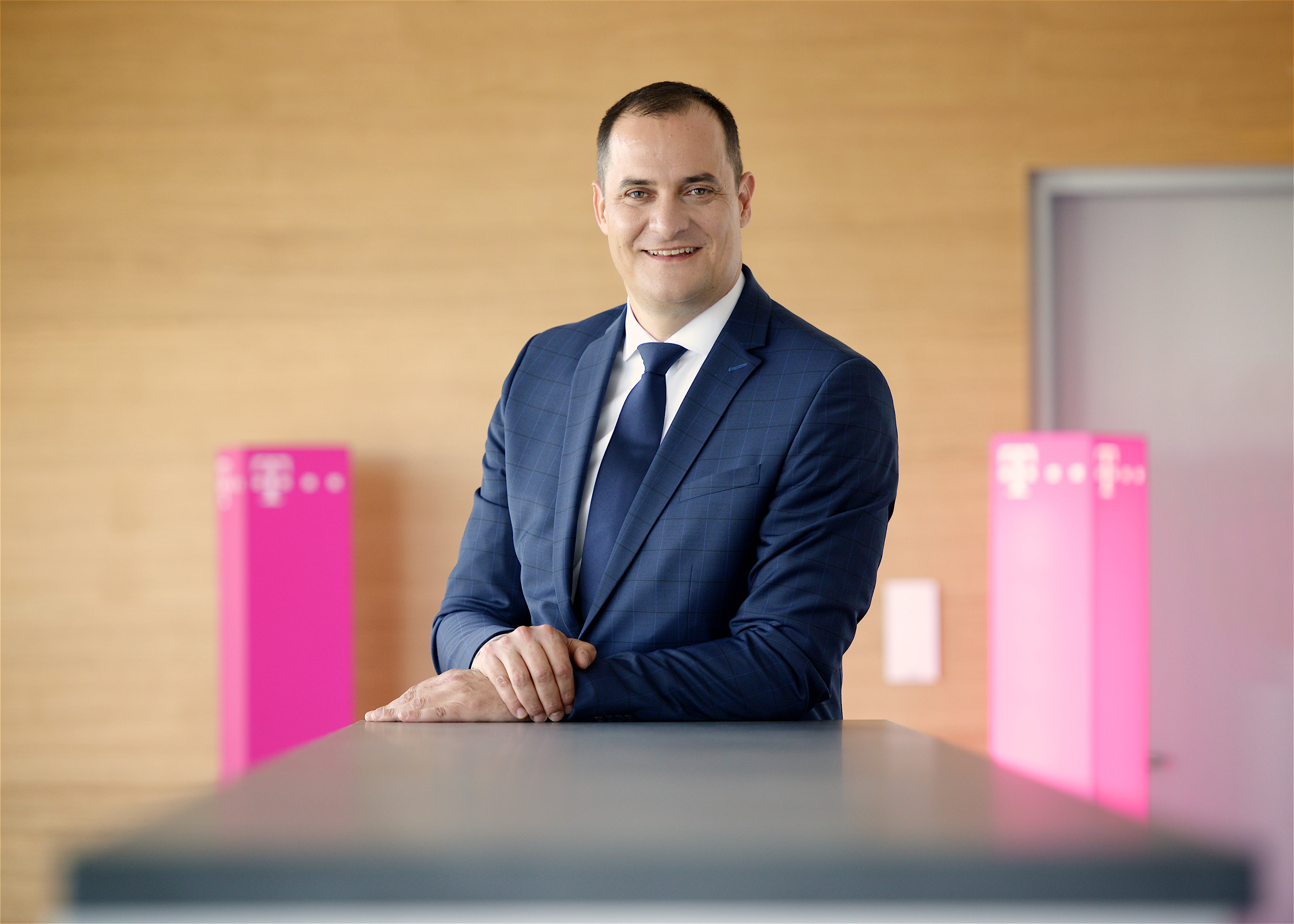 A Magyar Telekom Nyrt. vezérigazgatója